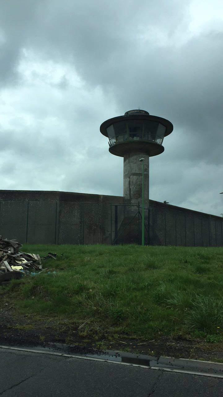 Gevangenis Lantin gelegen te Luik